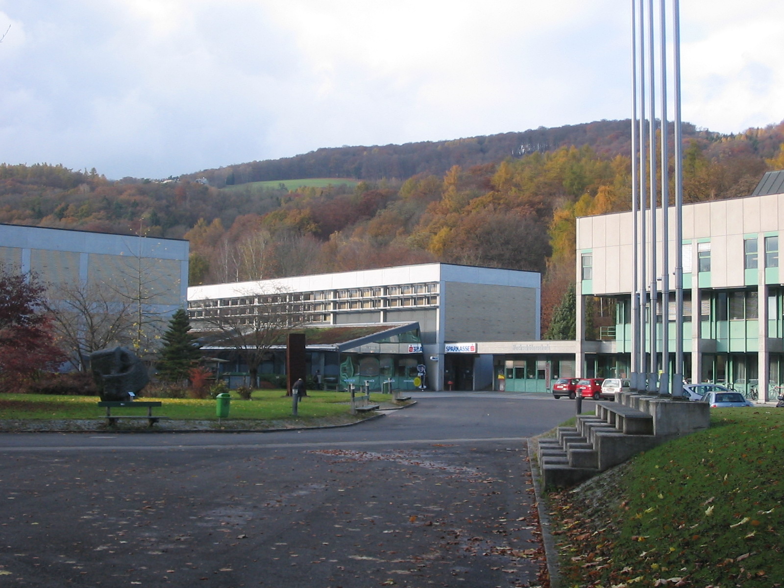 Campuszentrum